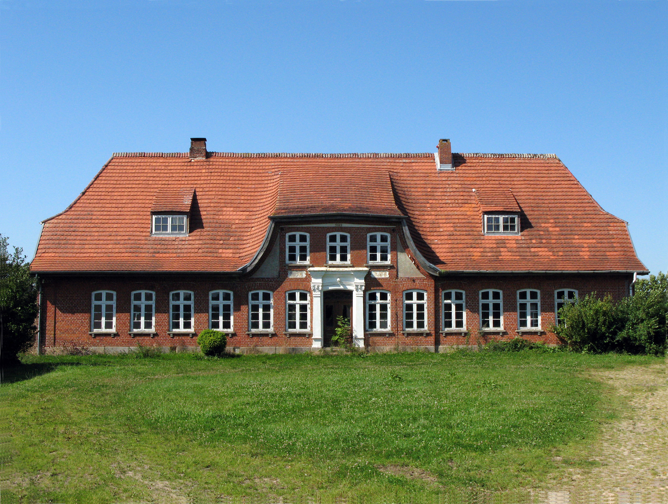 Hof Ahnebygaard, Wohnhaus